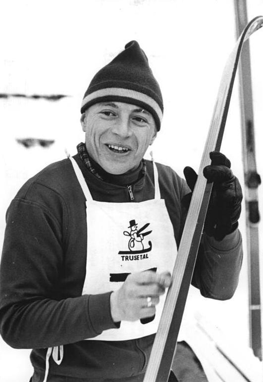 Zentralbild Demme 18.1.1968 Oberwiesenthal - Vierte Olympia-Qualifikation im Spezialsprunglauf (Sieg für Manfred Queck) Aus der vierten Olympia-Qualifikation der DDR-Skispringer ging am 18.1.1968 in Oberwiesenthal Manfred Queck (SC Dynamo Klingenthal) als Sieger hervor. Queck stand auf der großen Fichtelbergschanze 79 und 82 Meter und verwies mit Note 227,5 die Mitbewerber sicher auf die Plätze. (Archivfoto)